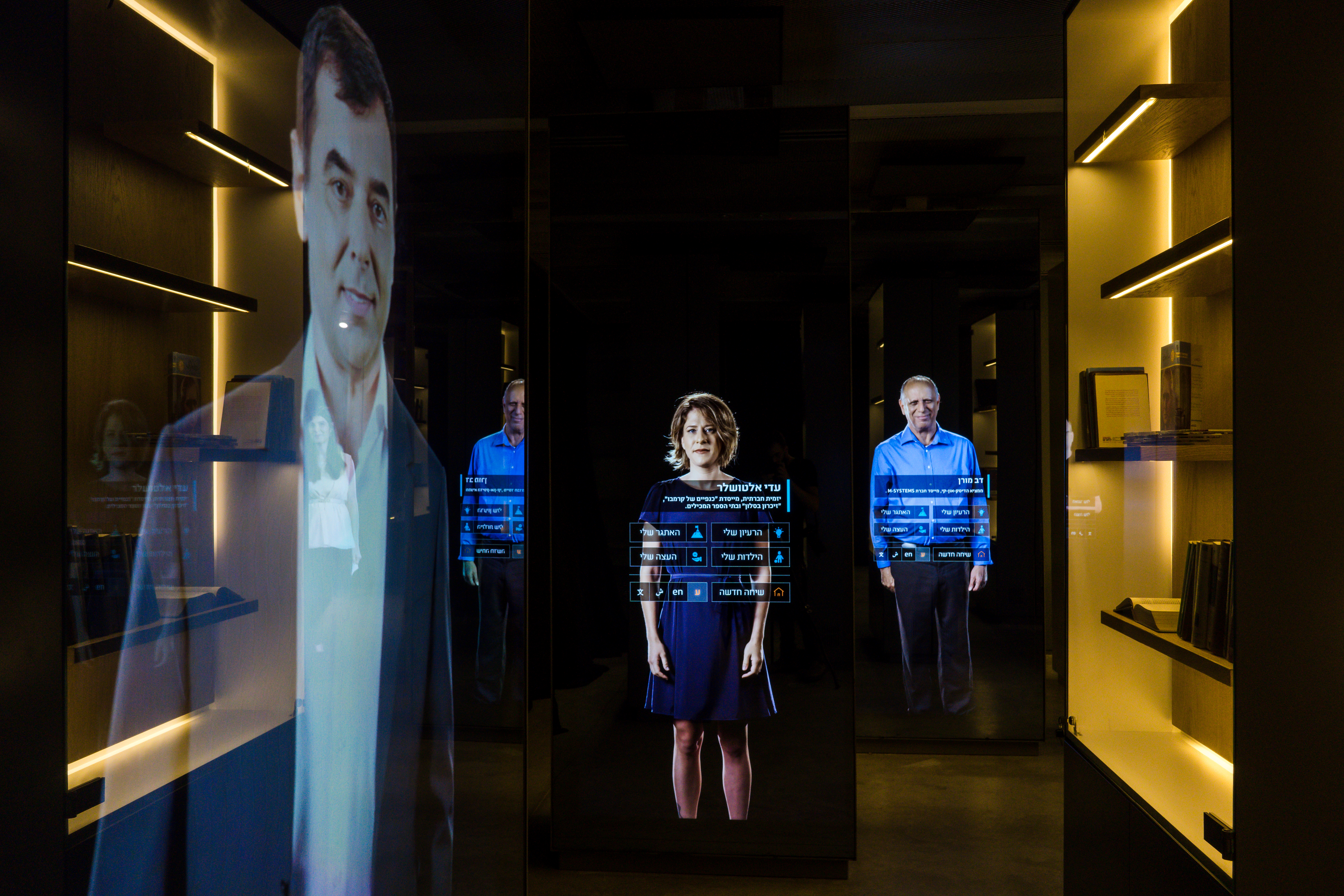 הולוגרמות של פורצי הדרך בחדשנות הישראלית